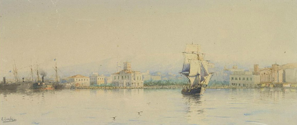 Piraeus harbour